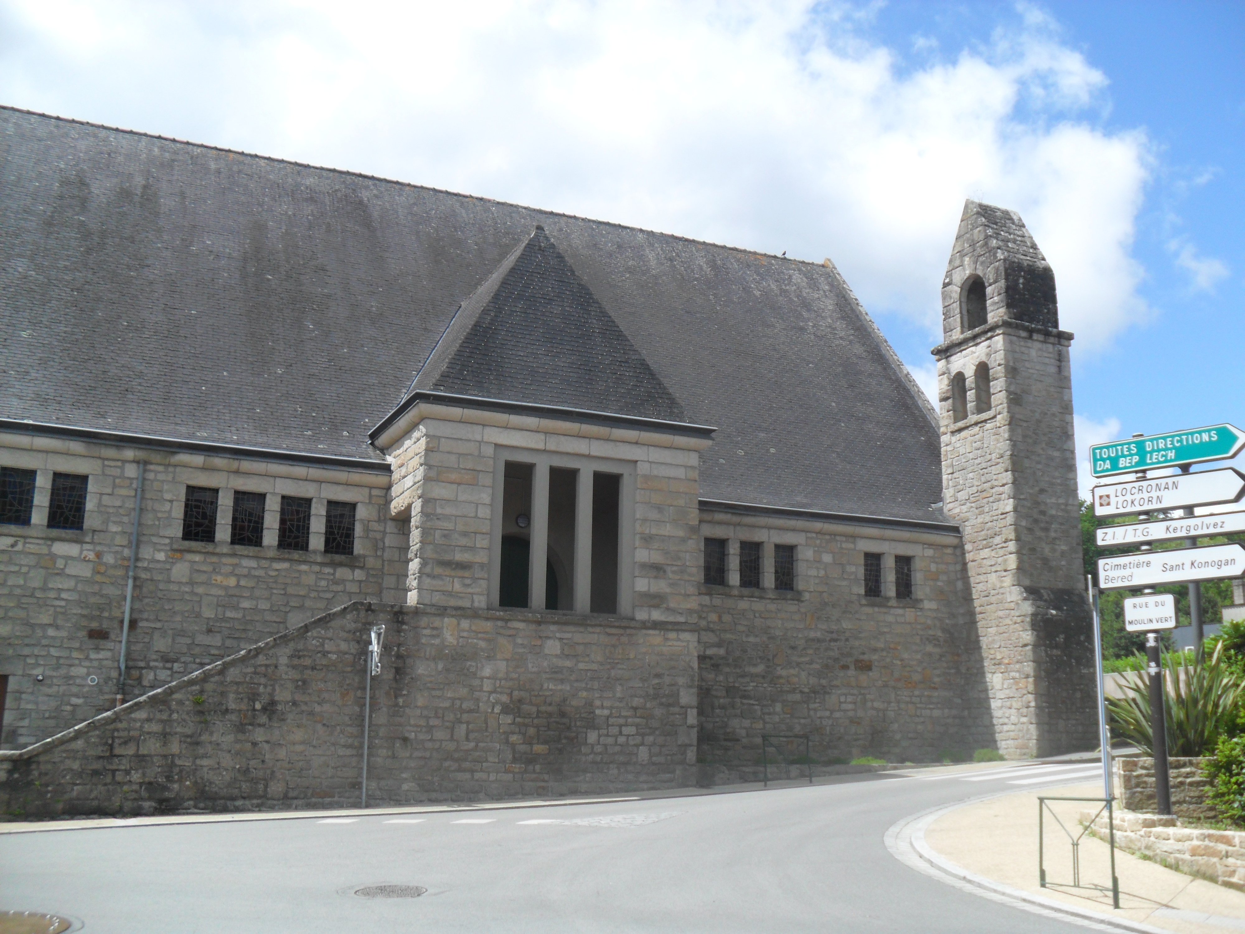 Église Saint-Pierre-Saint-Paul au Moulin vert, Quimper (France)